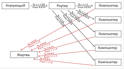 DoS-атака через роутер